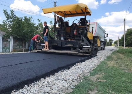 Ремонт дороги в Затишші